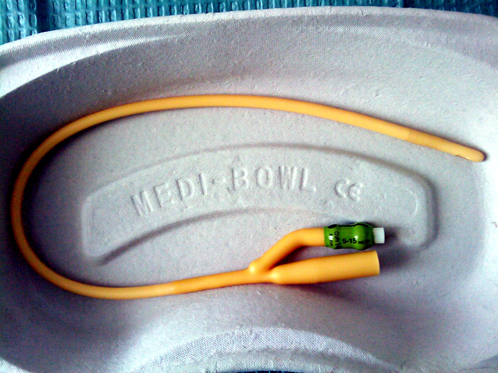 Sidik kisəsinə yeridilmək üçün kateter